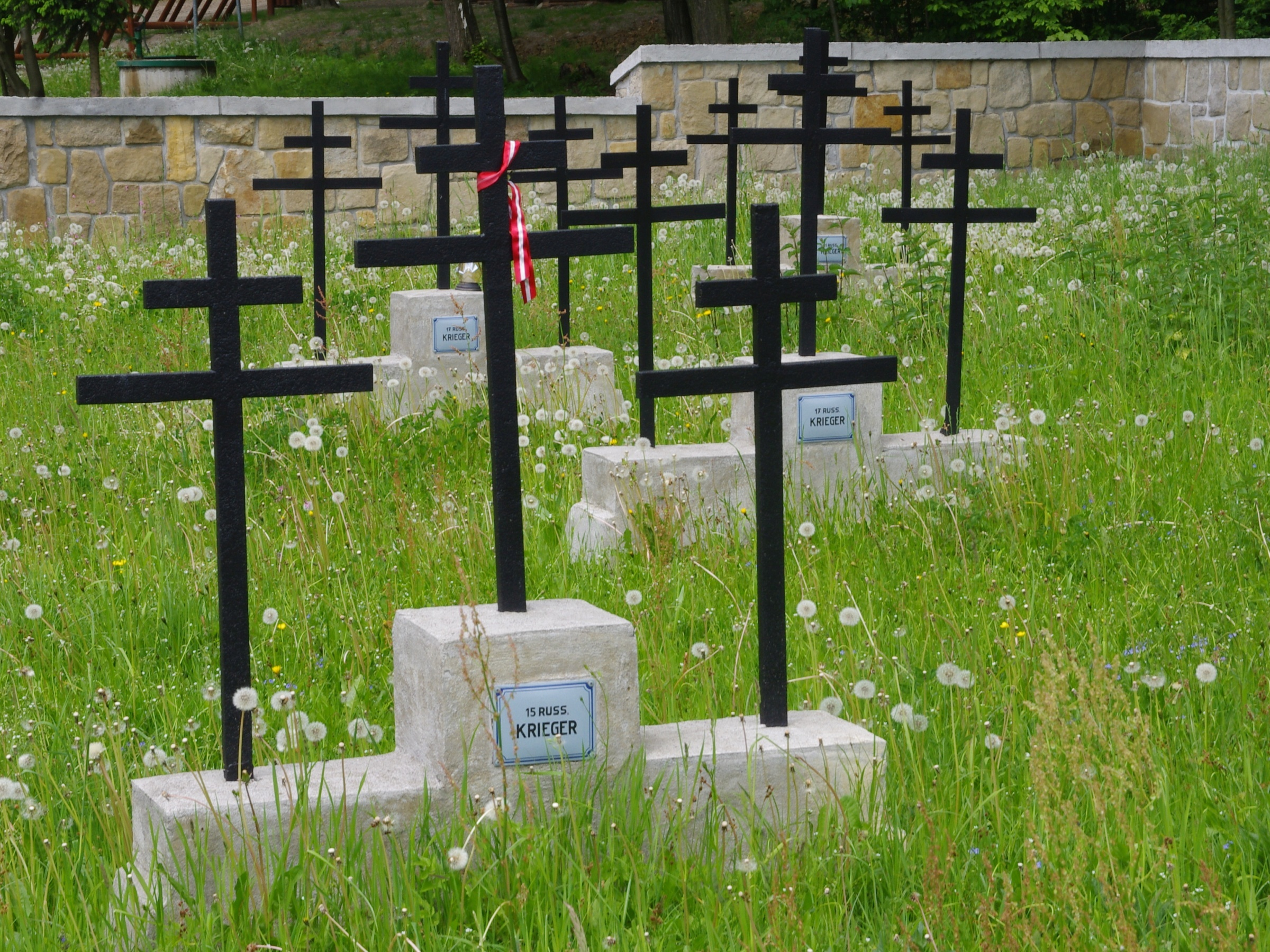 Cmentarz wojenny nr 122 - Łużna